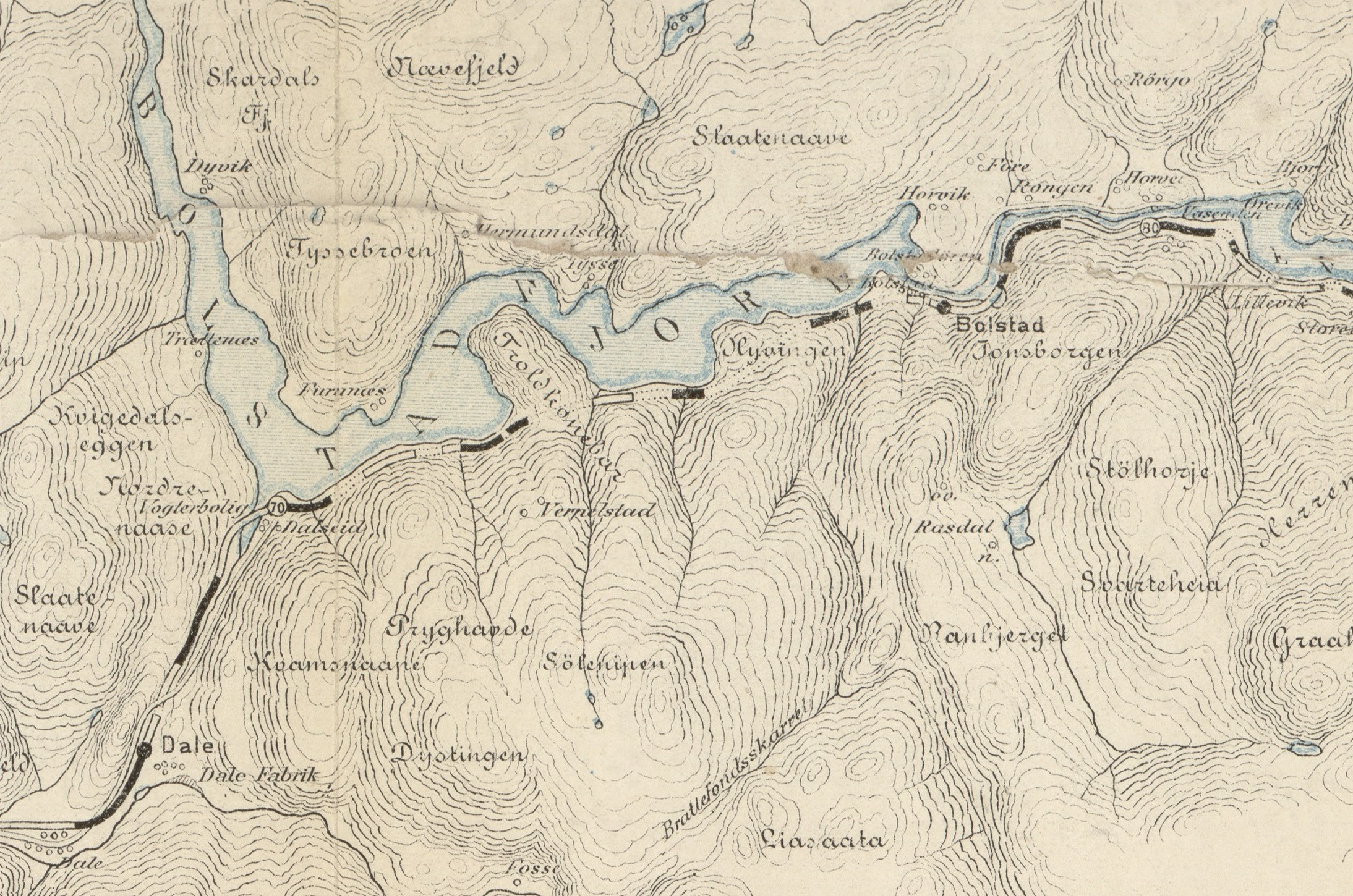 Kart fra Nasjonalbibliotekets kartsamling. Kartet er gitt ut i (1886) og viser Voss, Tog.